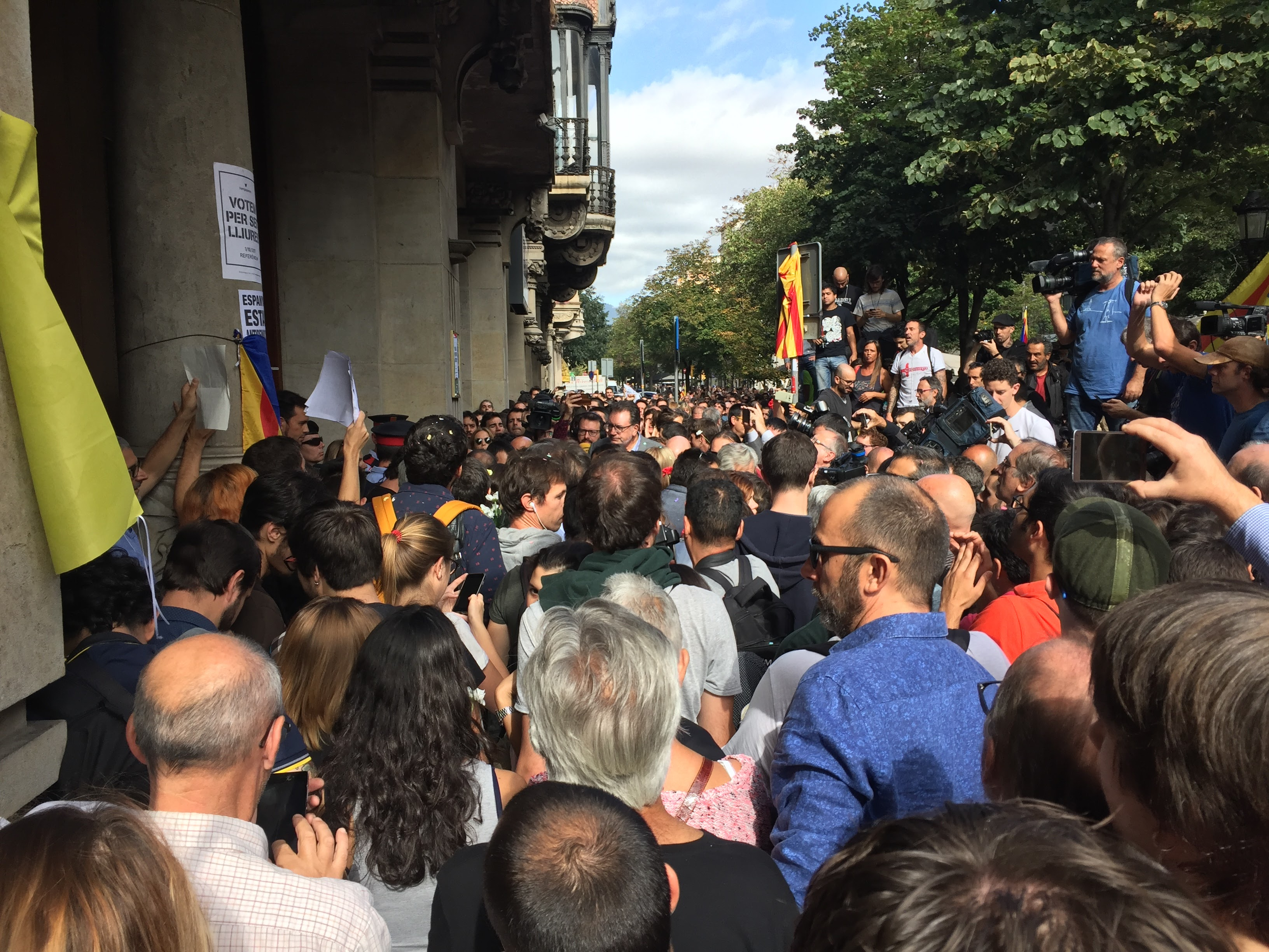 Operació Anubis a la Conselleria d'Economia